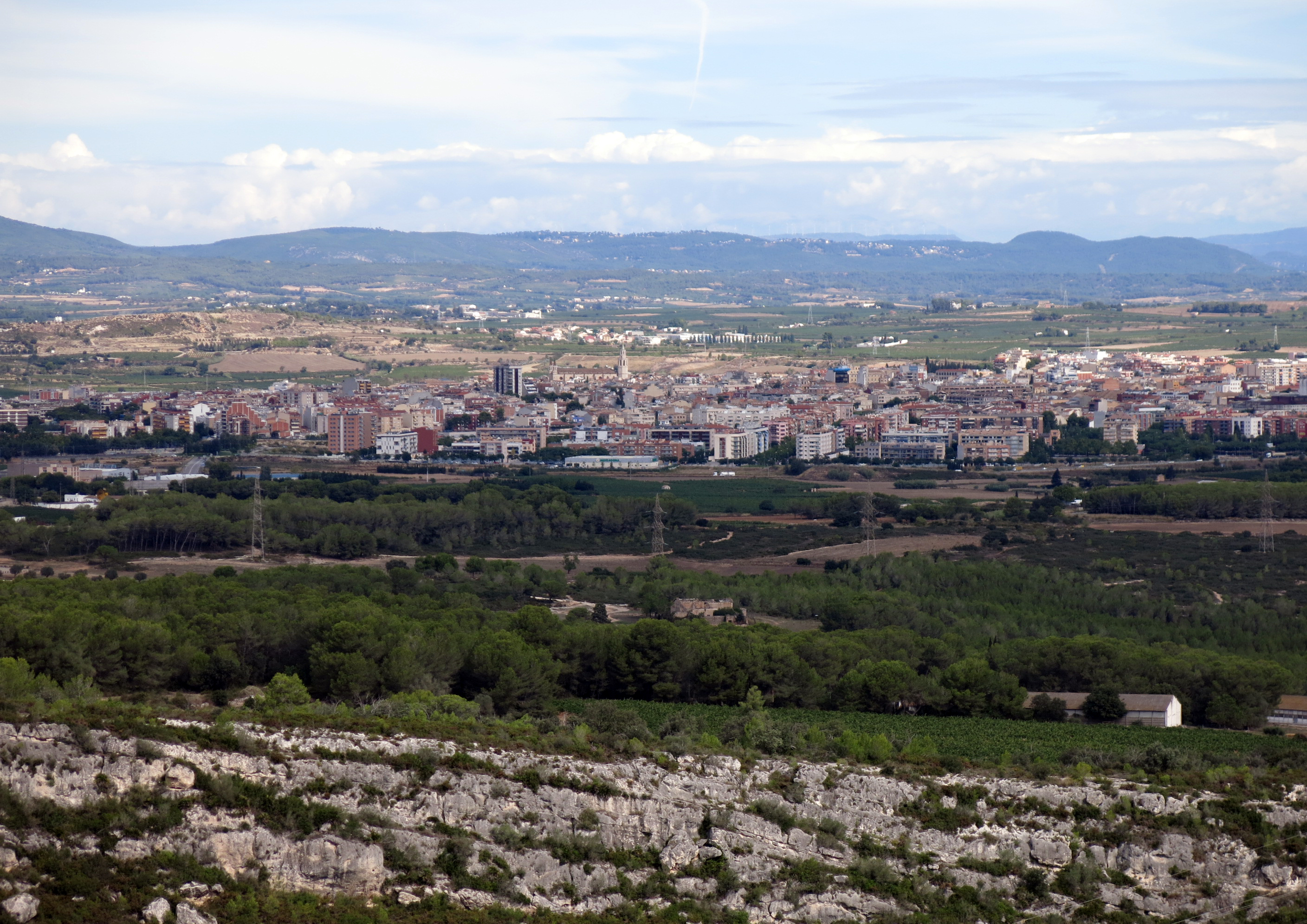 Vilafranca del Penedès des del jaciment d'Olèrdola